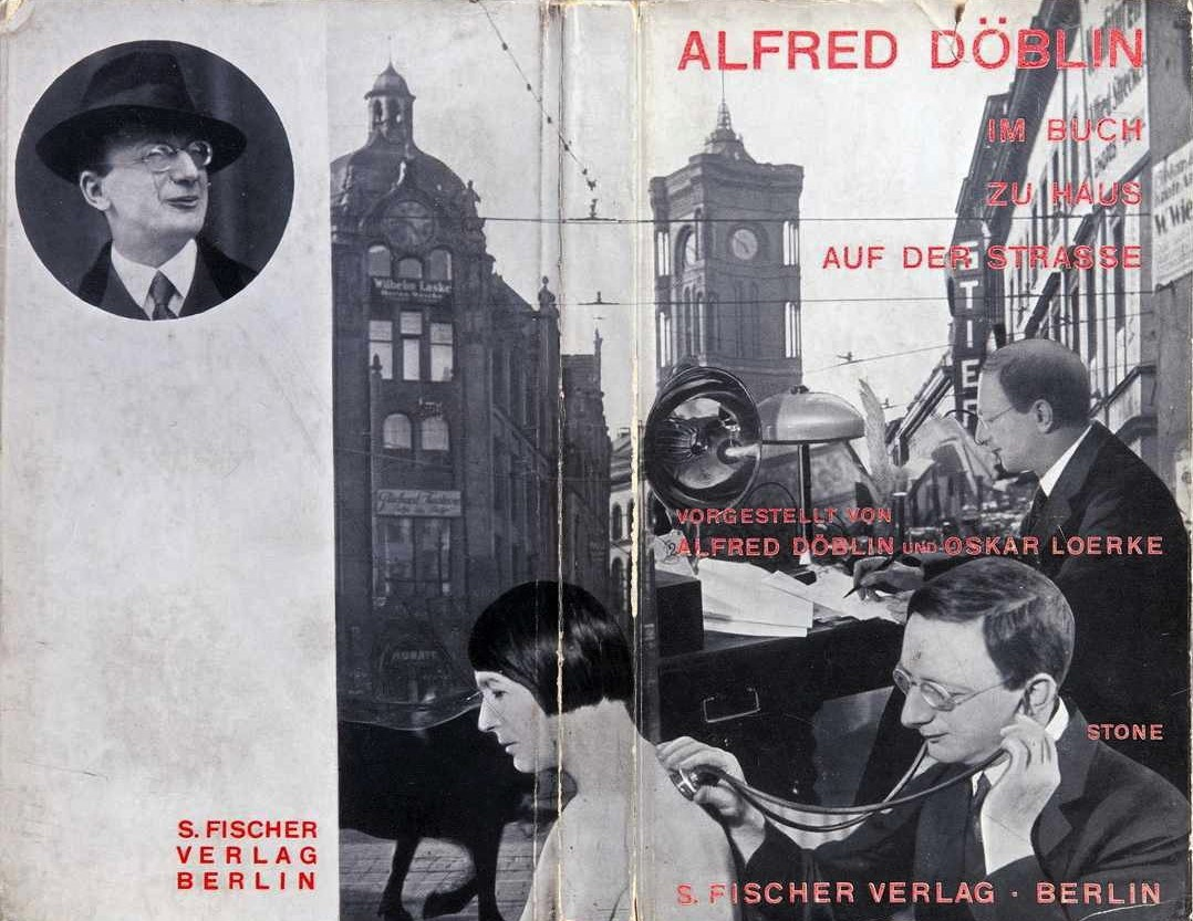 Alfred Döblin: Im Buch - Zu Haus - Auf der Straße. Vorgestellt von Alfred Döblin und Oskar Loerke. Berlin, S. Fischer Verlag 1928, Schutzumschlag (Fotomontage) von Sasha Stone